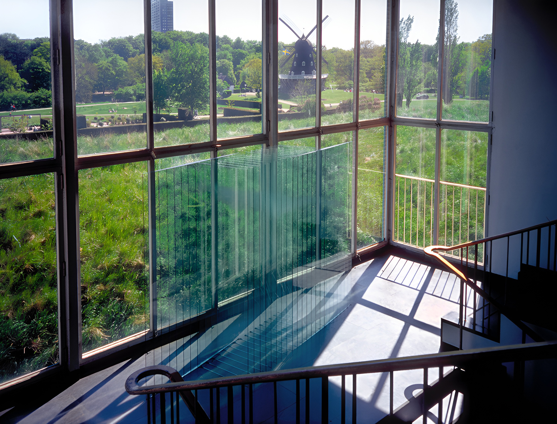 Malmö Museum 2000.